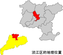 内容介绍：浈江区在韶关地图上的标示 原创者：zhuwq 创作日期：2005年1月 创作方法：将广东地图用扫描仪输入电脑，再将图片导入FLASH，用画笔描出轮廓，着填充，删除原图片，导出JPG图象便大工告成，这样制作的优点是，开始辛苦了点，但绘制别的县市便替换颜色即可。